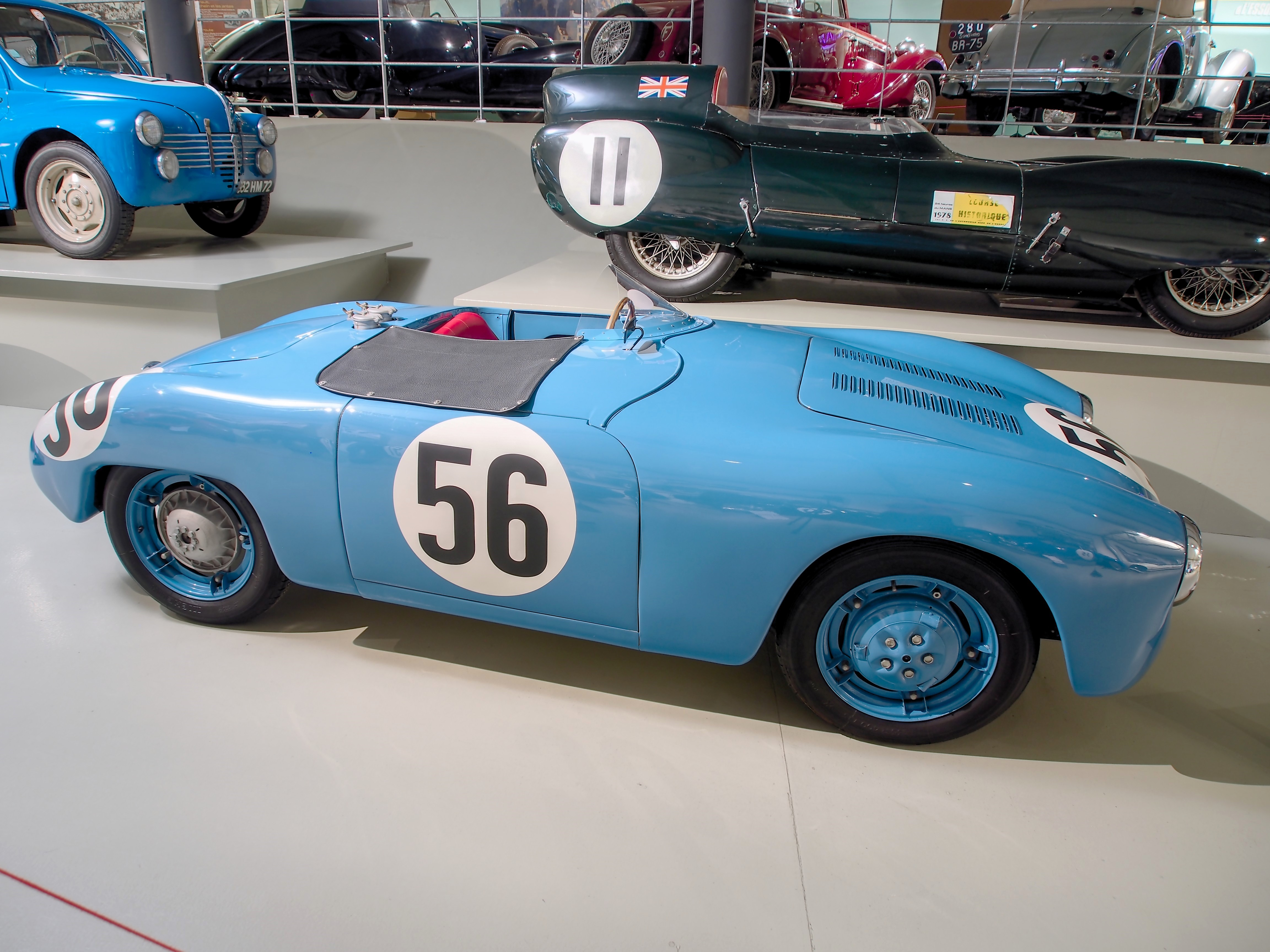 Photographed at Musée des 24 Heures du Mans, France.